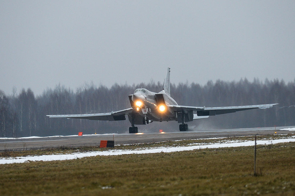 Возвращение самолётов дальней авиации ВКС России на аэродромы базирования (Калужская область, аэродром Шайковка).